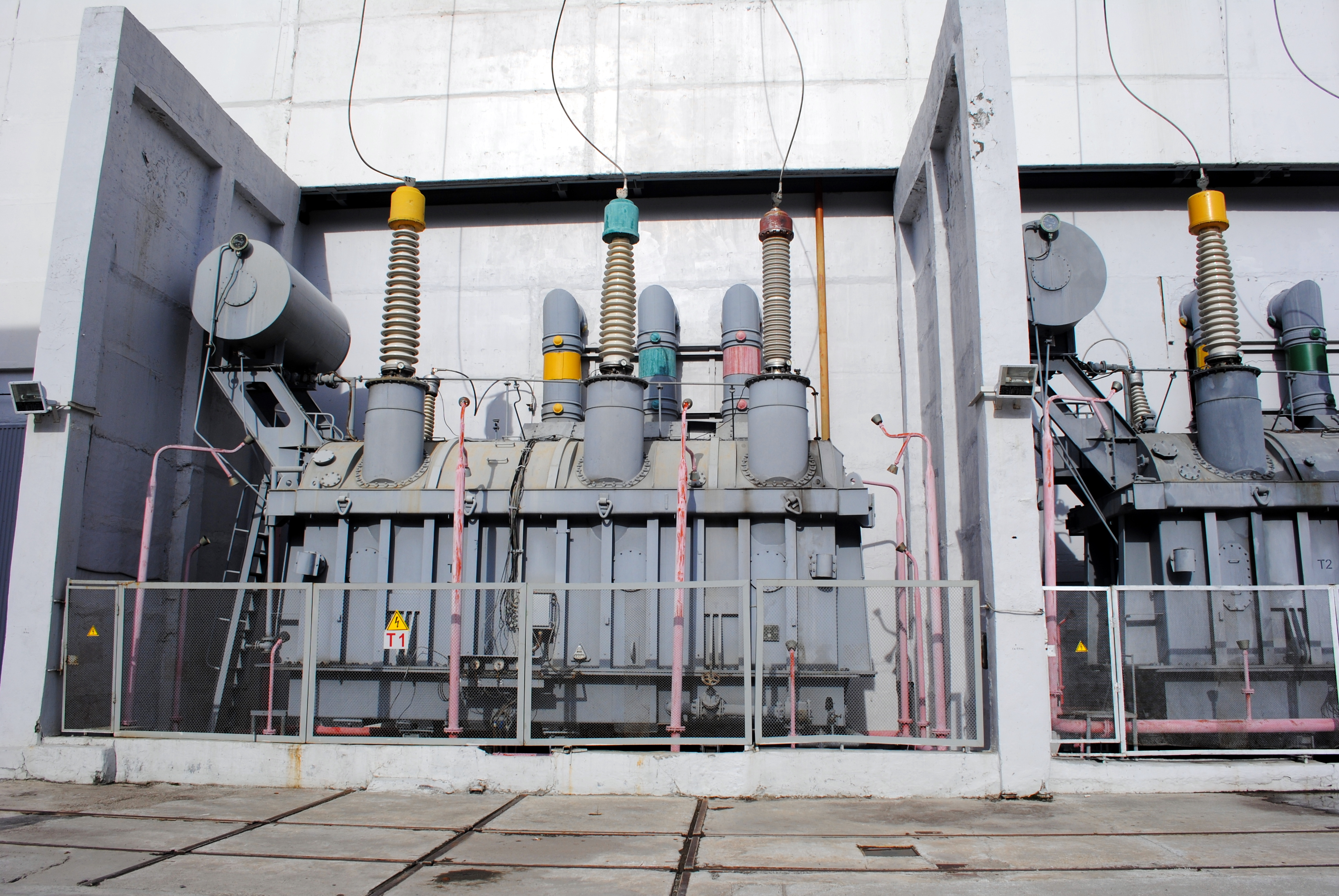 Трансформатор Колымской ГЭС